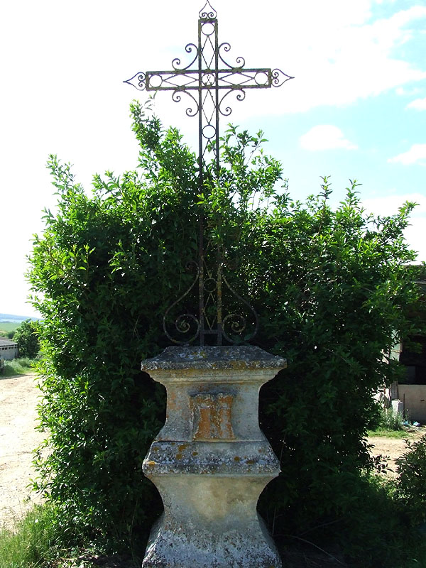 Calvaire de Bois-Avril (commune d'Étais-la-Sauvin)